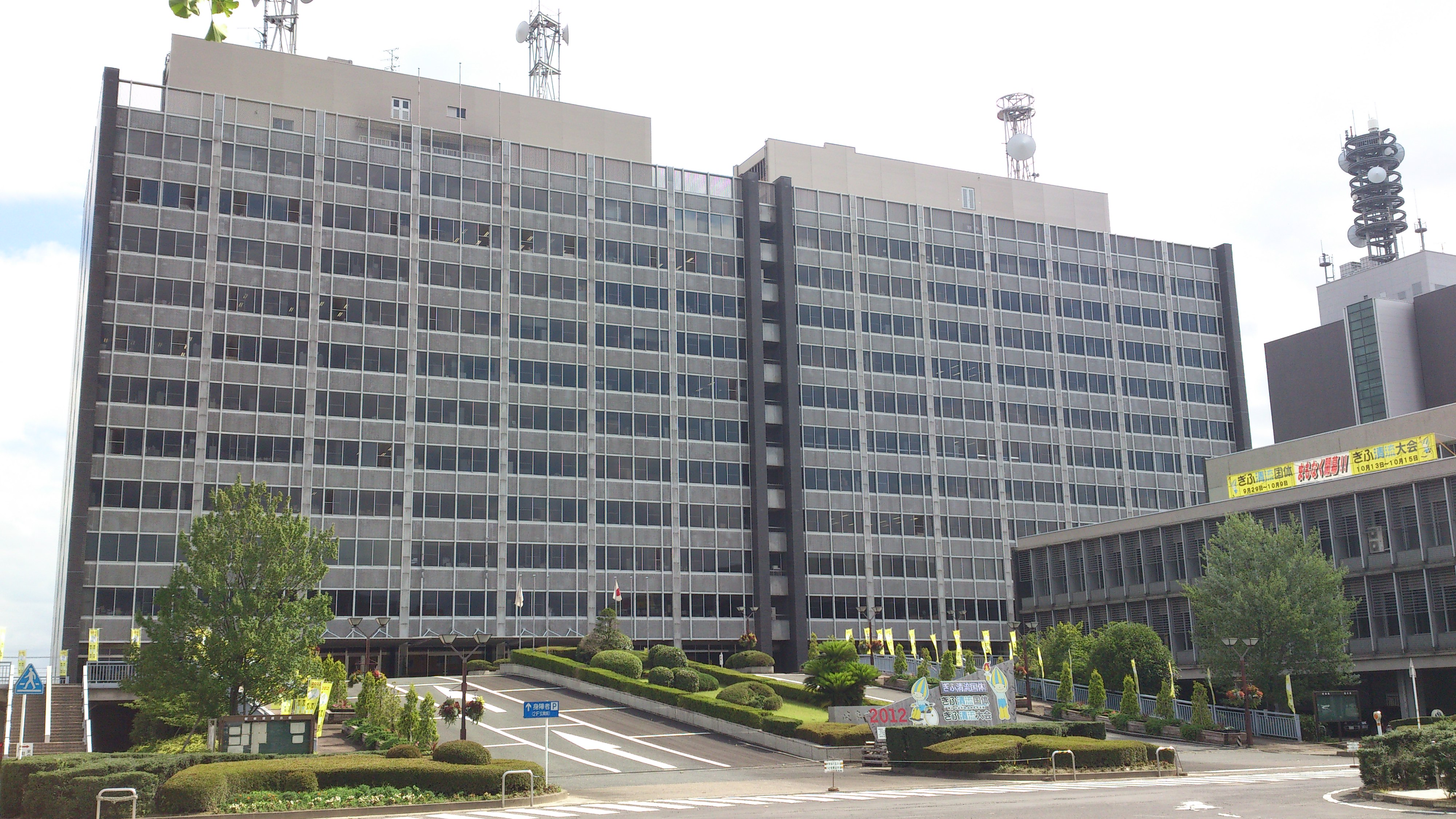 庁舎北側より撮影。